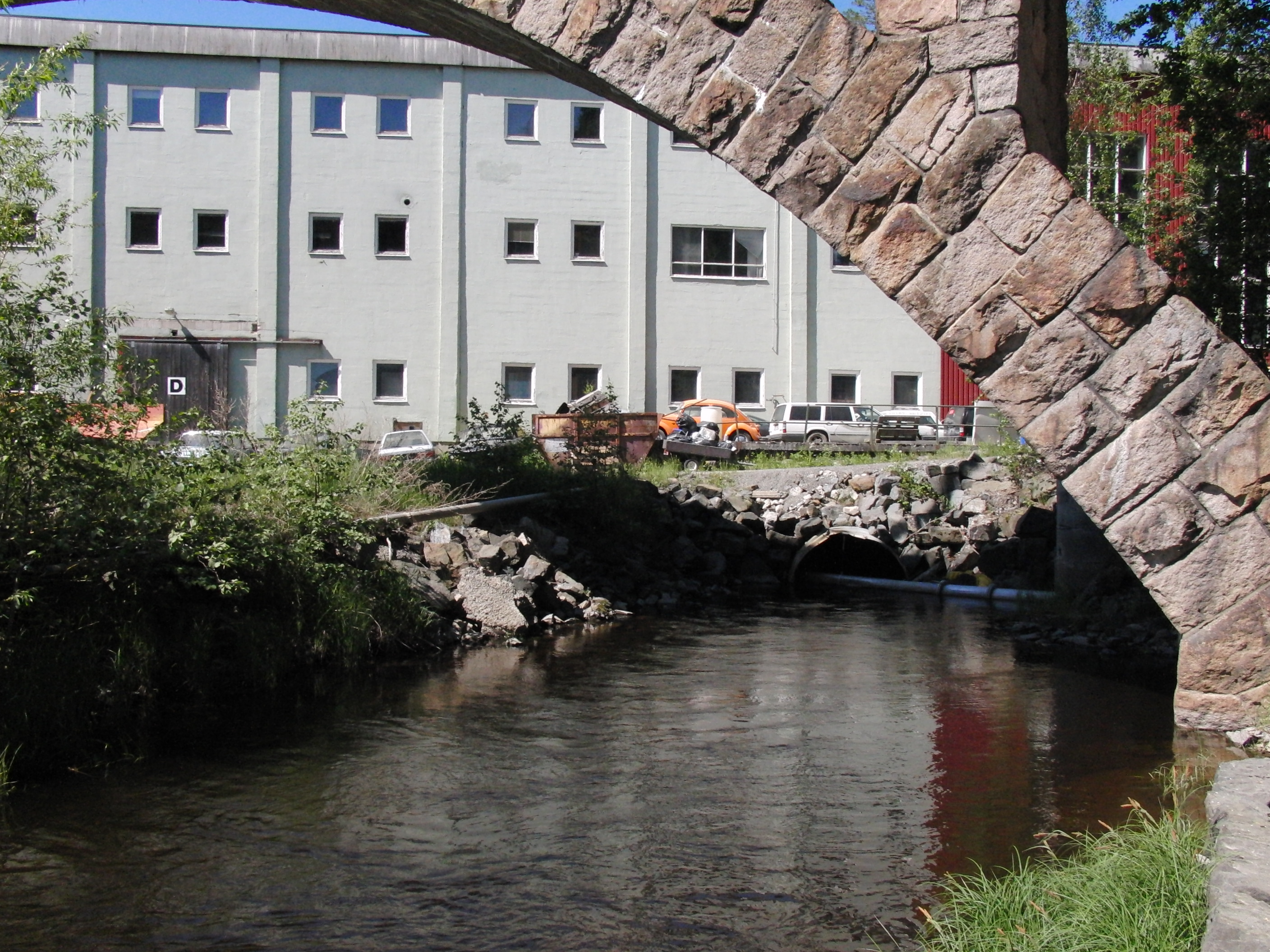 Skjærdalselva kraftverk